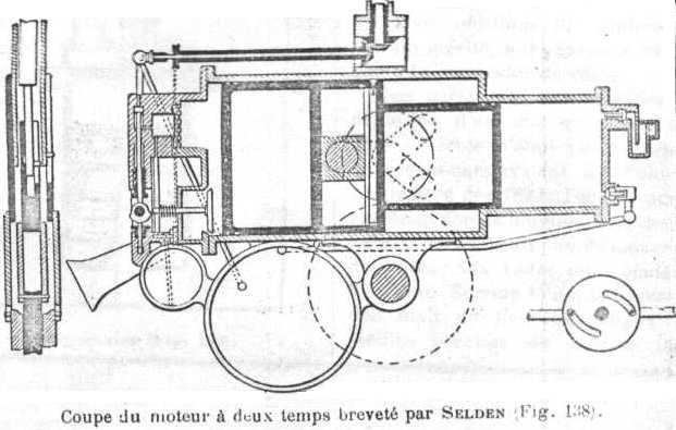 Moteur Selden (1877) basé sur les principes du moteur de George Brayton. Tous les deux sont des ancètres du moteur Diesel.